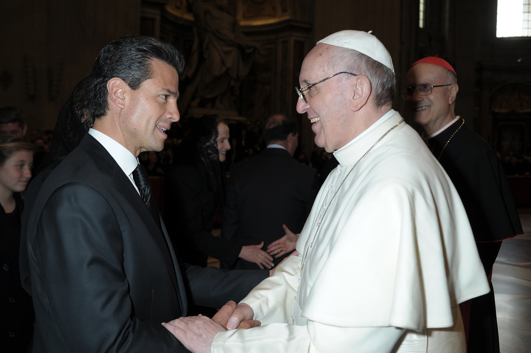 Salutación de Su Santidad el Papa a los Jefes de Estado y de Gobierno. Ciudad del Vaticano. 18 marzo 2013.